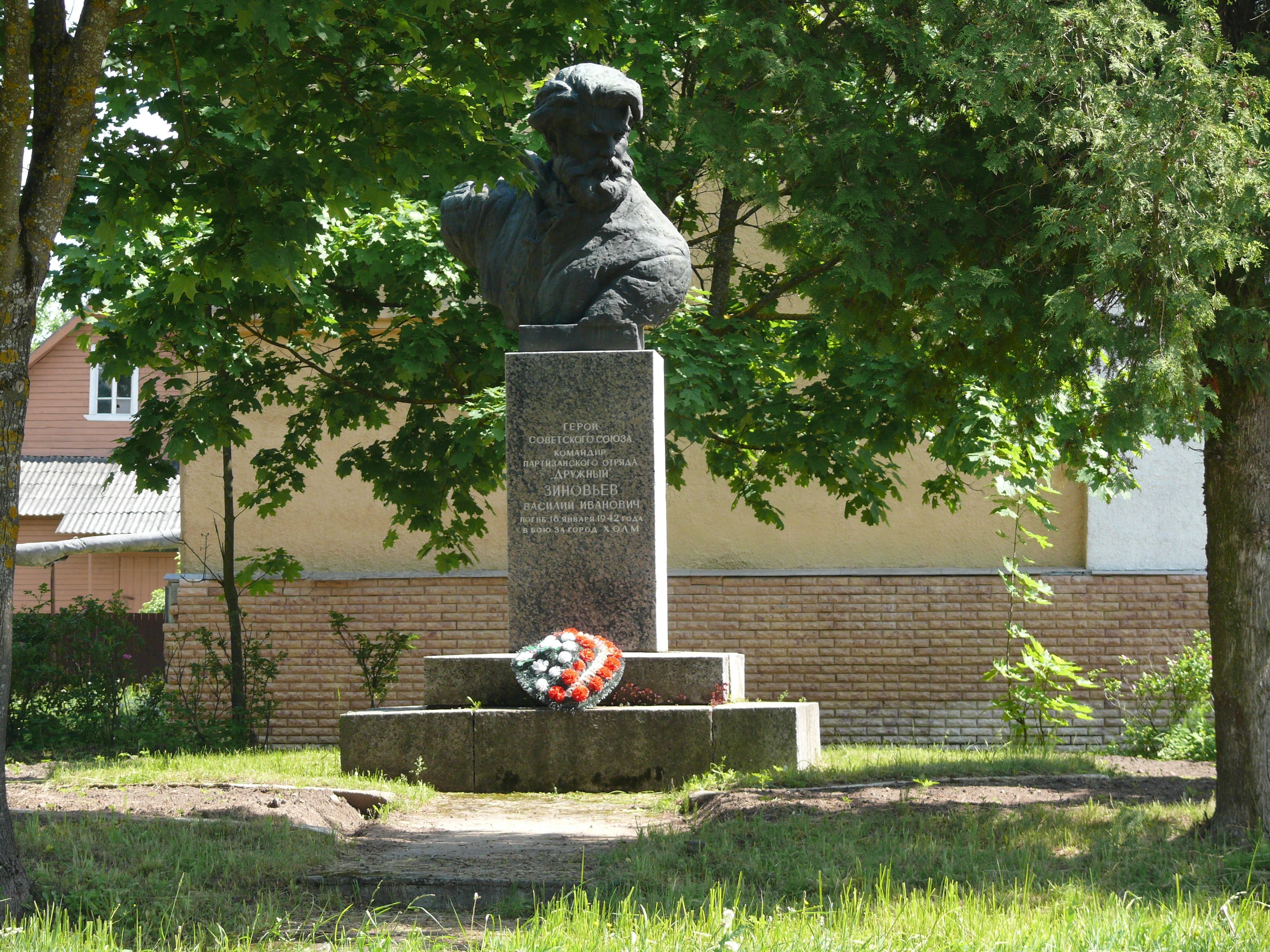 Памятник партизанскому командиру Василию Зиновьеву в Холме, Новгородская область